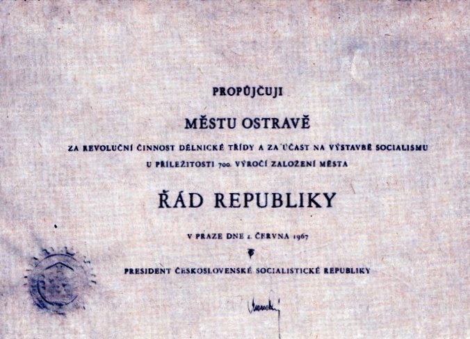 Řád republiky udělený roku 1967 městu Ostravě.